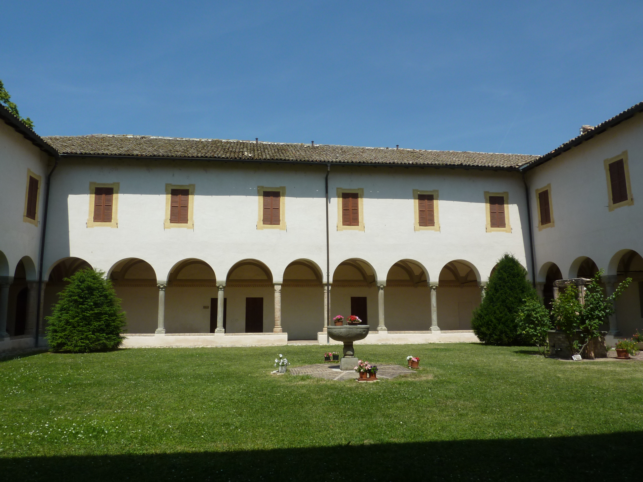 Il chiostro della Badia di Santa Maria della Neve a Torrechiara.